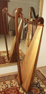 Spanische Barockharfe von Tim Hoborough Banff Schottland